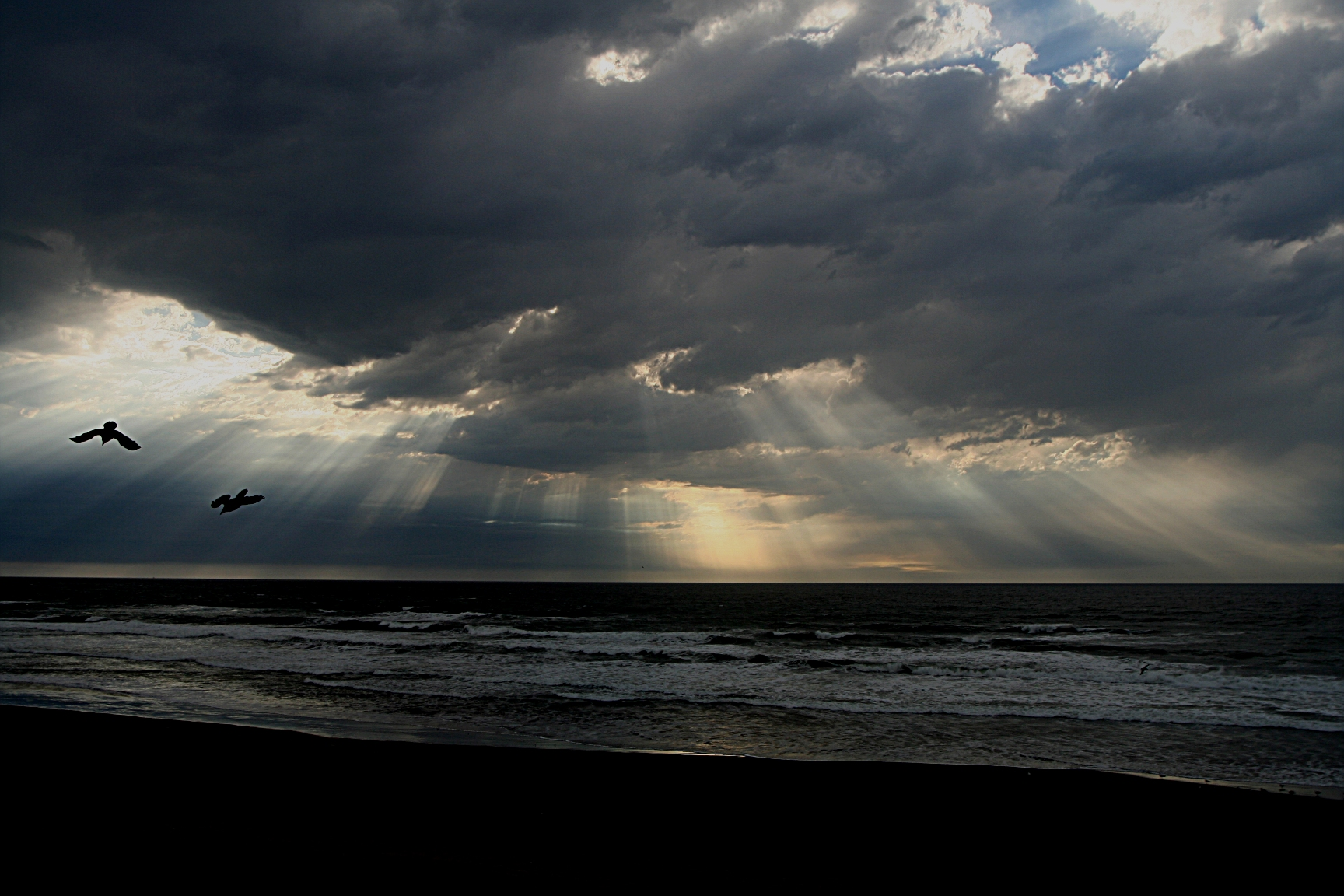 Crepuscular Rays